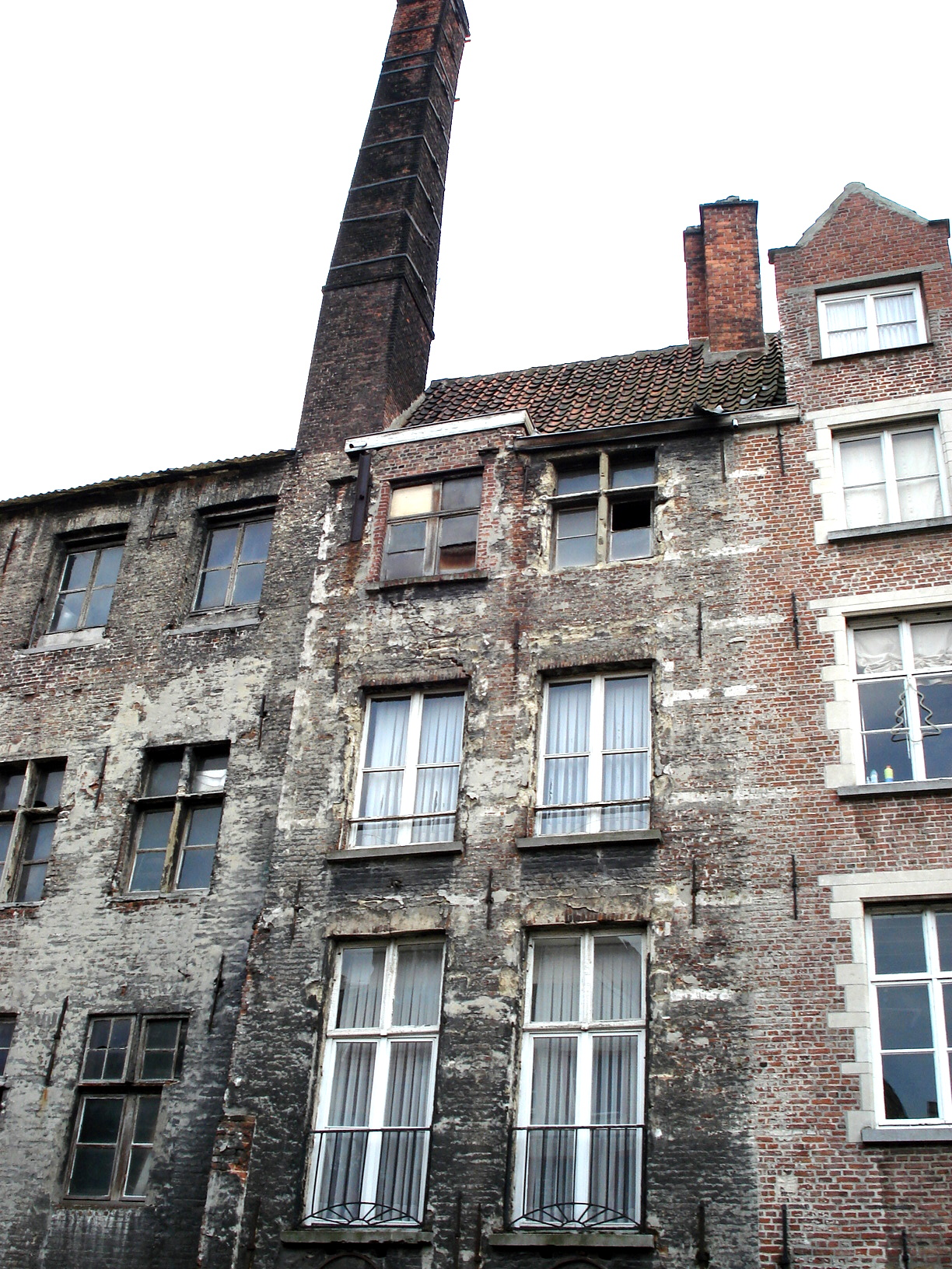 Gand, Belgique: anciennes manufactures sur la Lys, dans le nord de la vieille ville.